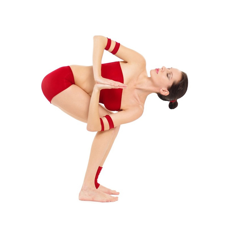 Parivrtta Utkatasana by Nina Mel, Yoga Teacher